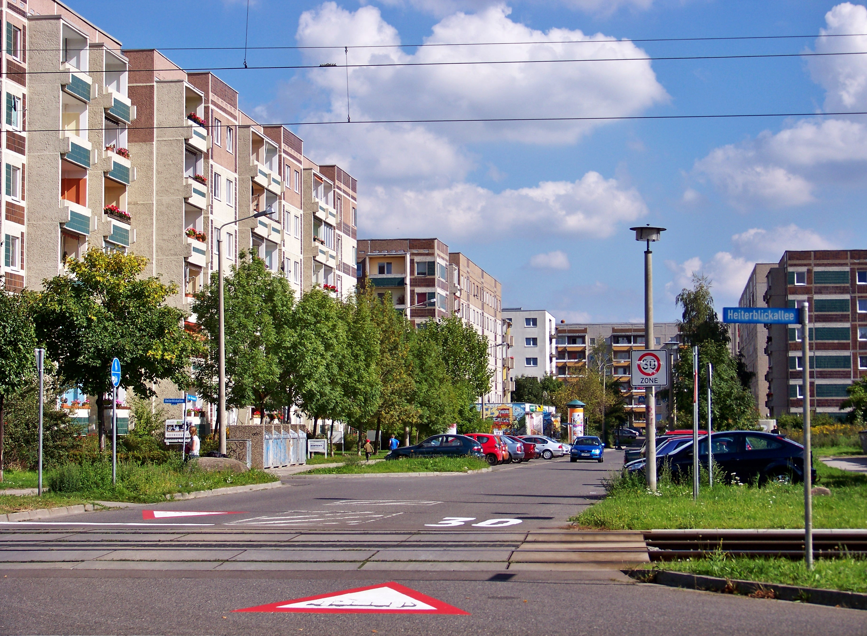 Blick in die Straße Am Vorwerk auf Höhe der Heiterblickallee im Plattenbauviertel Neu-Paunsdorf im Osten Leipzigs